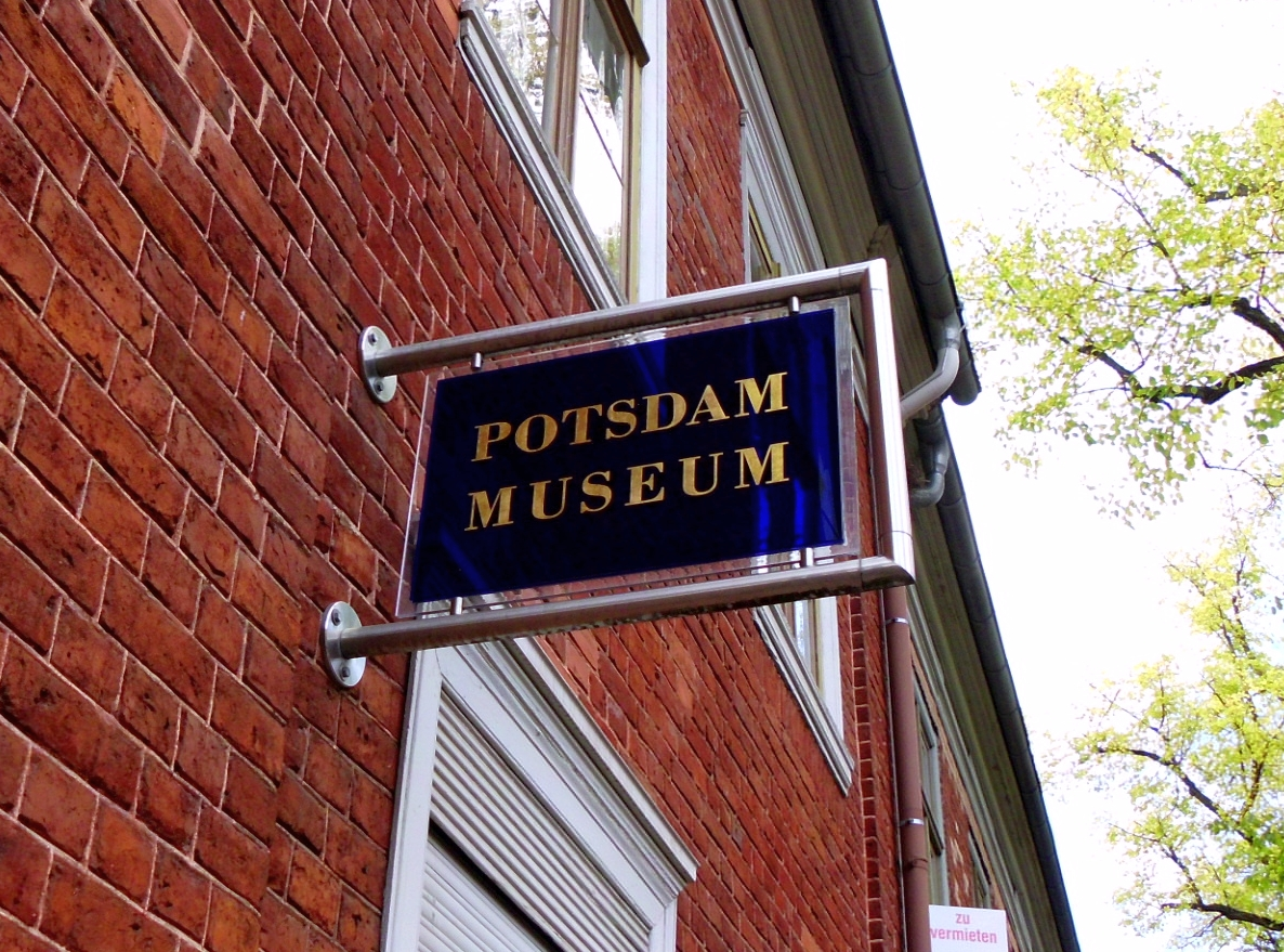 Original caption: "Schild der kleinen Galerie des Potsdam Museums in der Benkertstraße im Holländischen Viertel in Potsdam."Update 11 July 2016: Das Haus ist kein Museum mehr. Neue Eigentumswohnungen stehen hier zum Verkauf.